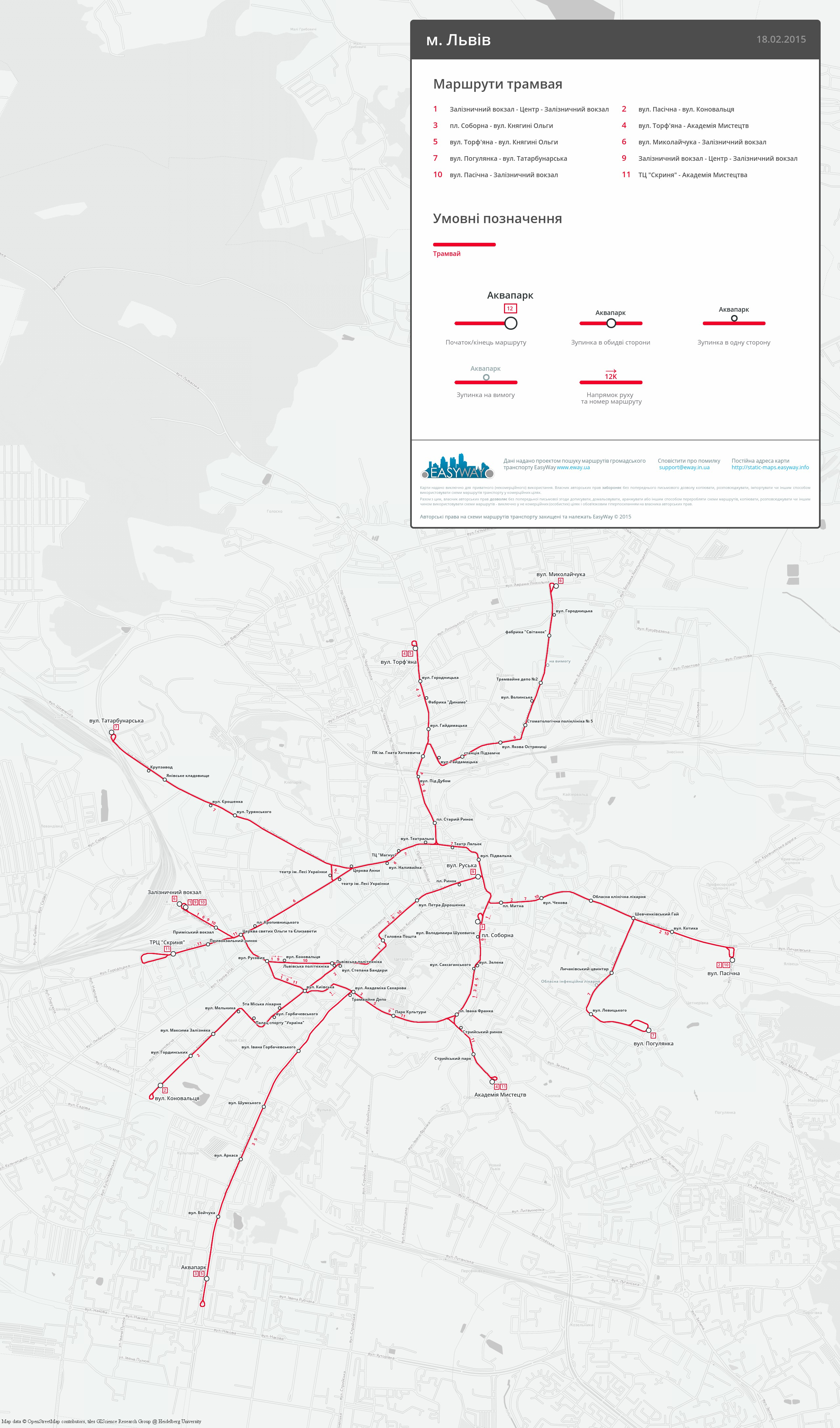 Схема трамвайних маршрутів у місті Львів